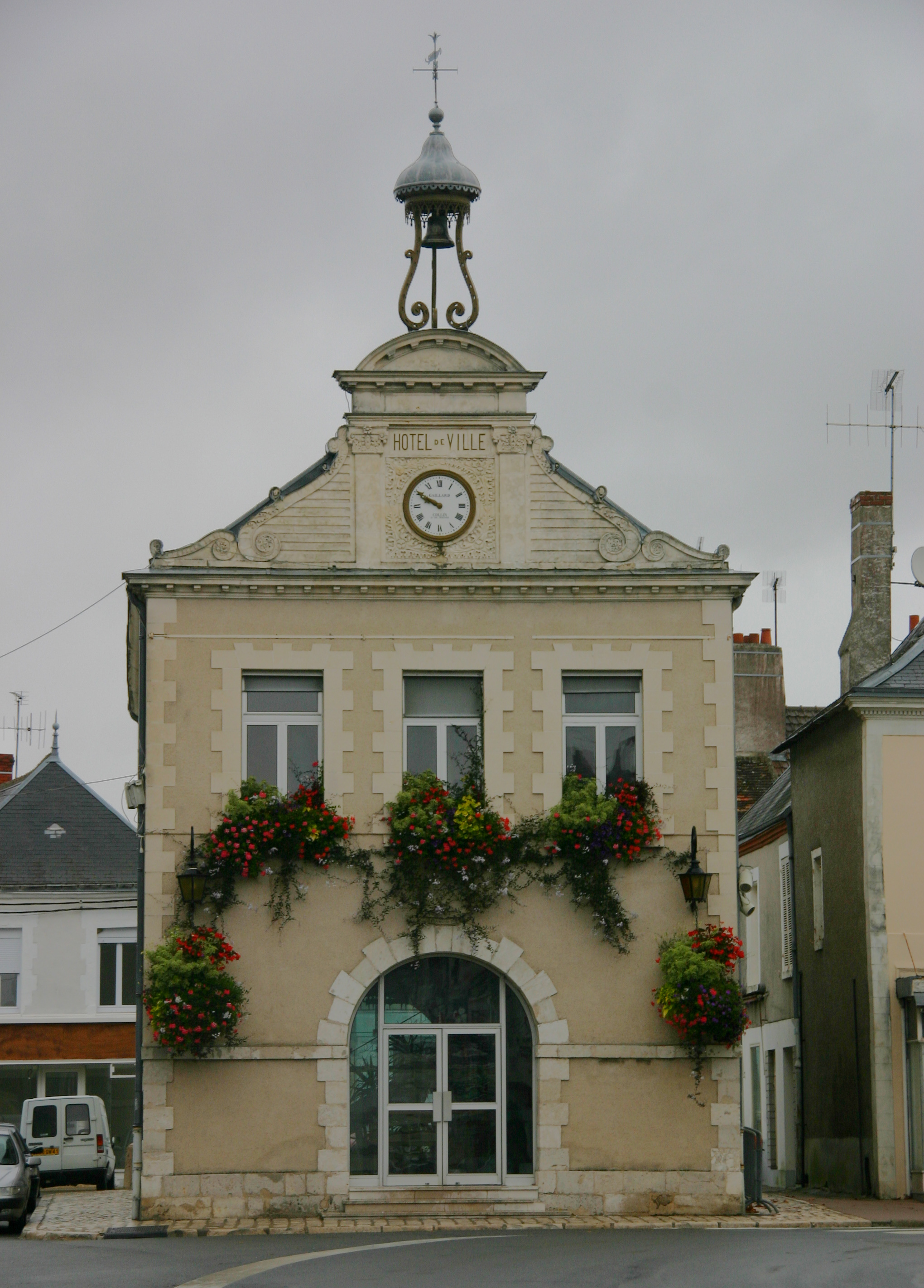 Oucques